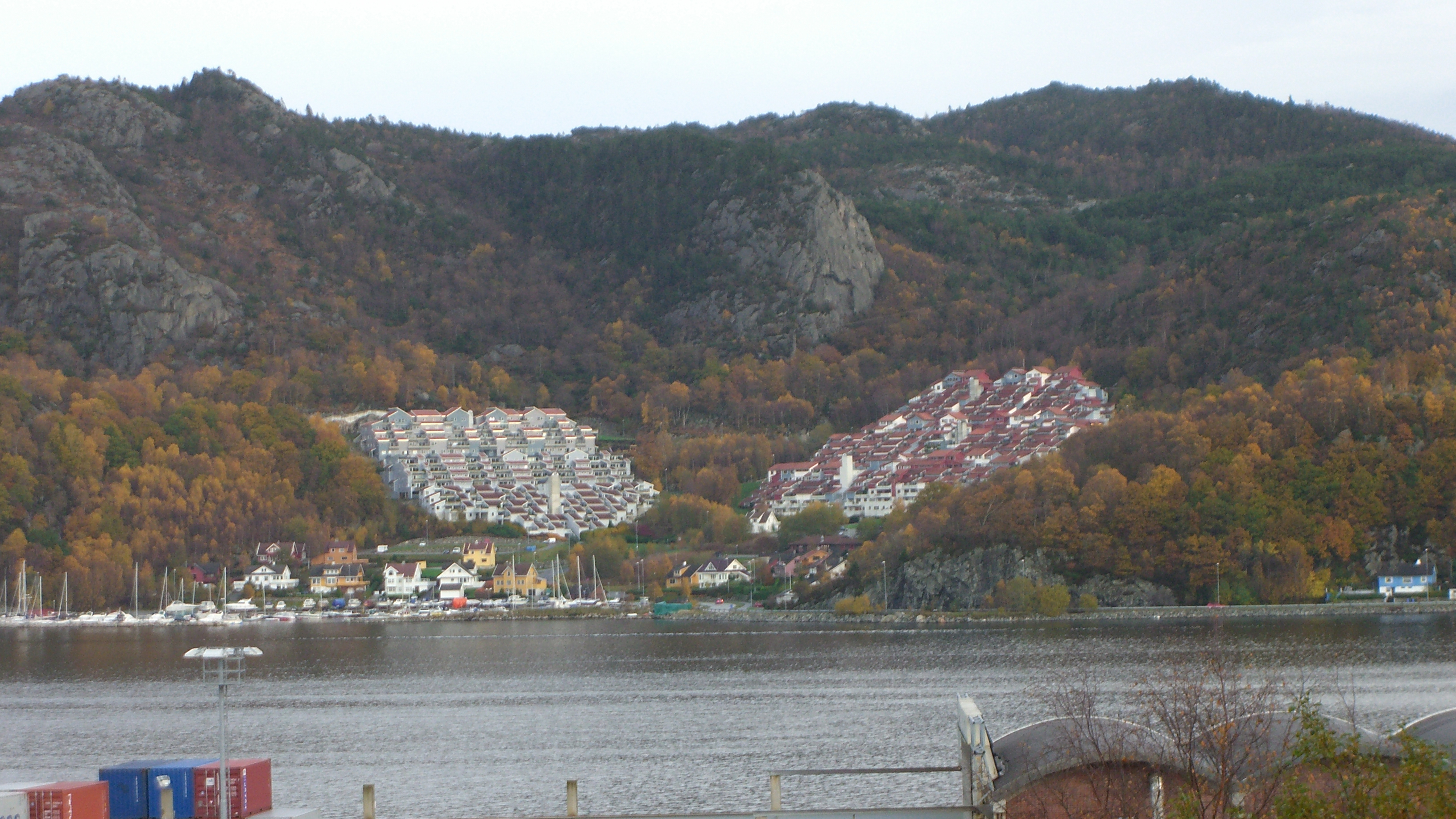 Sandvika in Sandnes, Norway